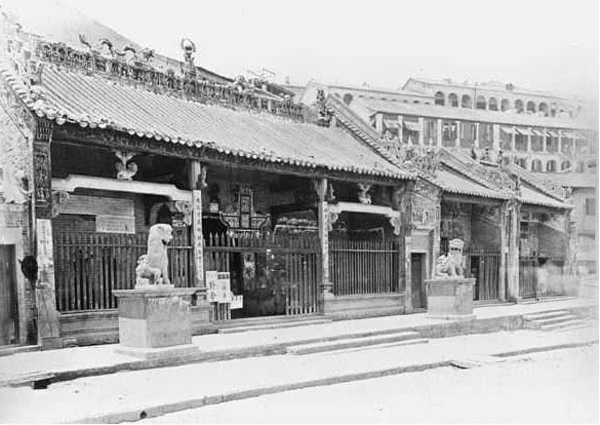 中文（香港）: 1868年香港文武廟。